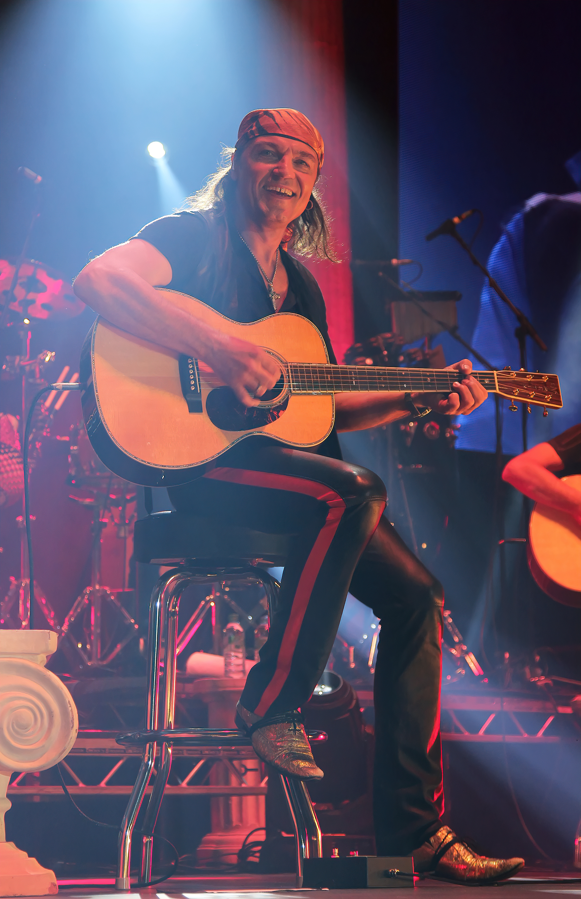 Matthias Jabs - Scorpions MTV Unplugged April 2014